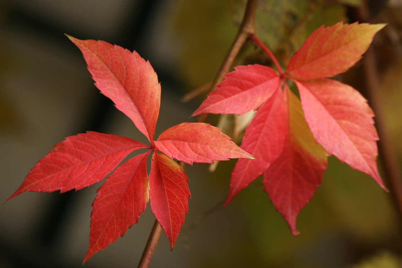 Feuille de vigne vierge (Parthenocissus quinquefolia) à l'automne